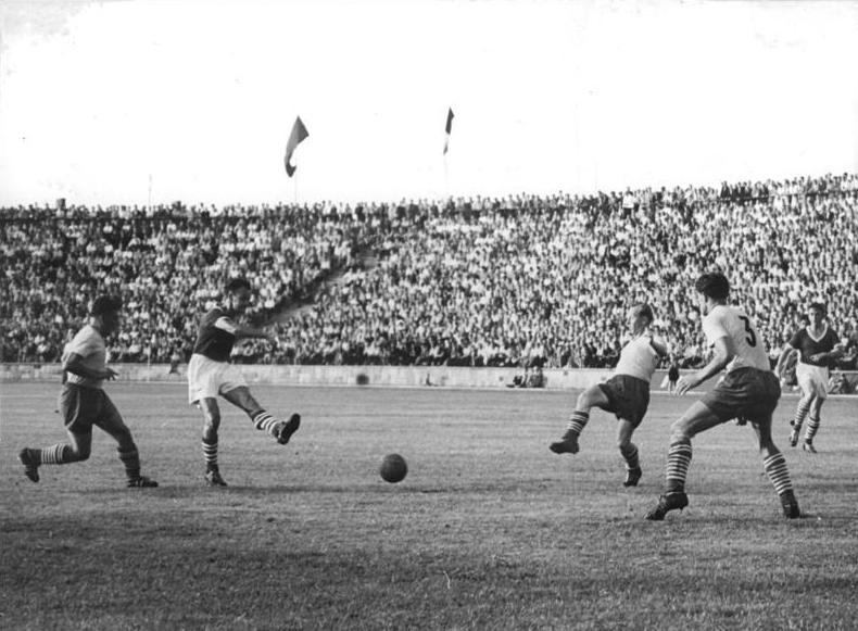 Zentralbild-Müller Bey-Ku 7.7.1957 Empor Rostock schlug Dynamo Berlin - Am Sonnabend, dem 6.7.1957, fand im Rostocker Ostseestadion das Fußball-Meisterschaftsspiel zwischen Empor Rostock und Dynamo Berlin statt. Durch eine 0:1-Niederlage erlitt der Tabellenführer Dynamo die erste Niederlage dieser Saison. UBz.: Der Berliner Spieler Maschke (2.v.lk.) schießt auf das Rostocker Tor. Der Ball prallte aber an den Abwehrspielern Zapf (Nr. 3) und Minuth (links daneben) ab.